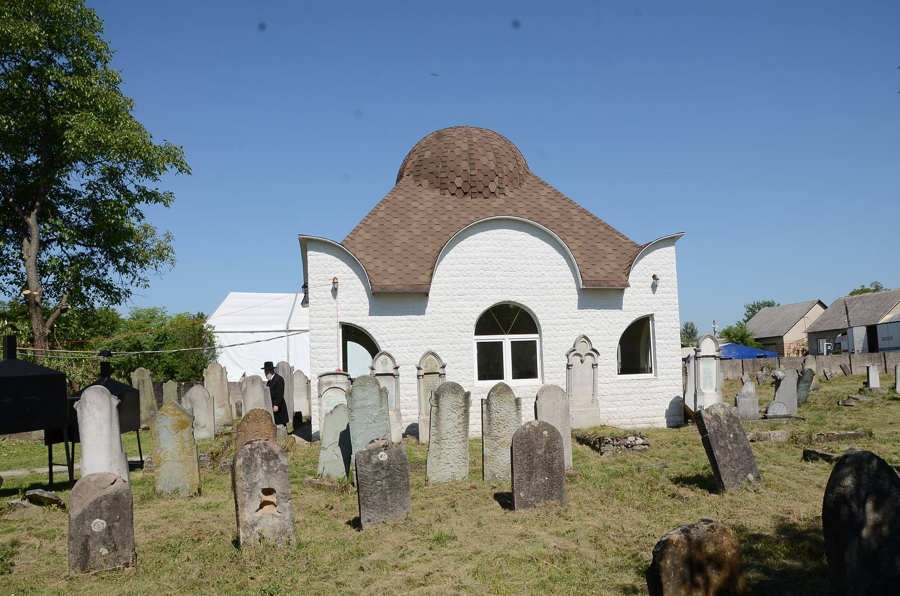 האוהל שהוקם על ציונו של רבי מרדכי מנדבורנה בעיירה בישטינא